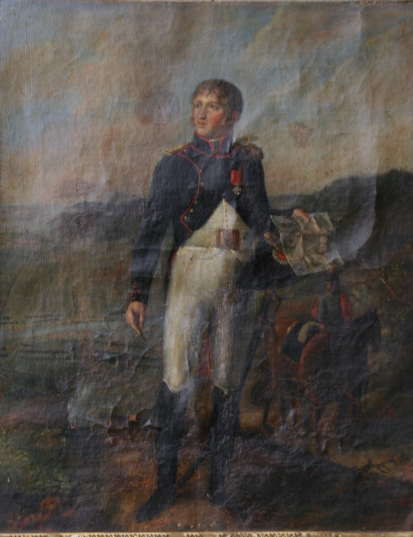 Jeune